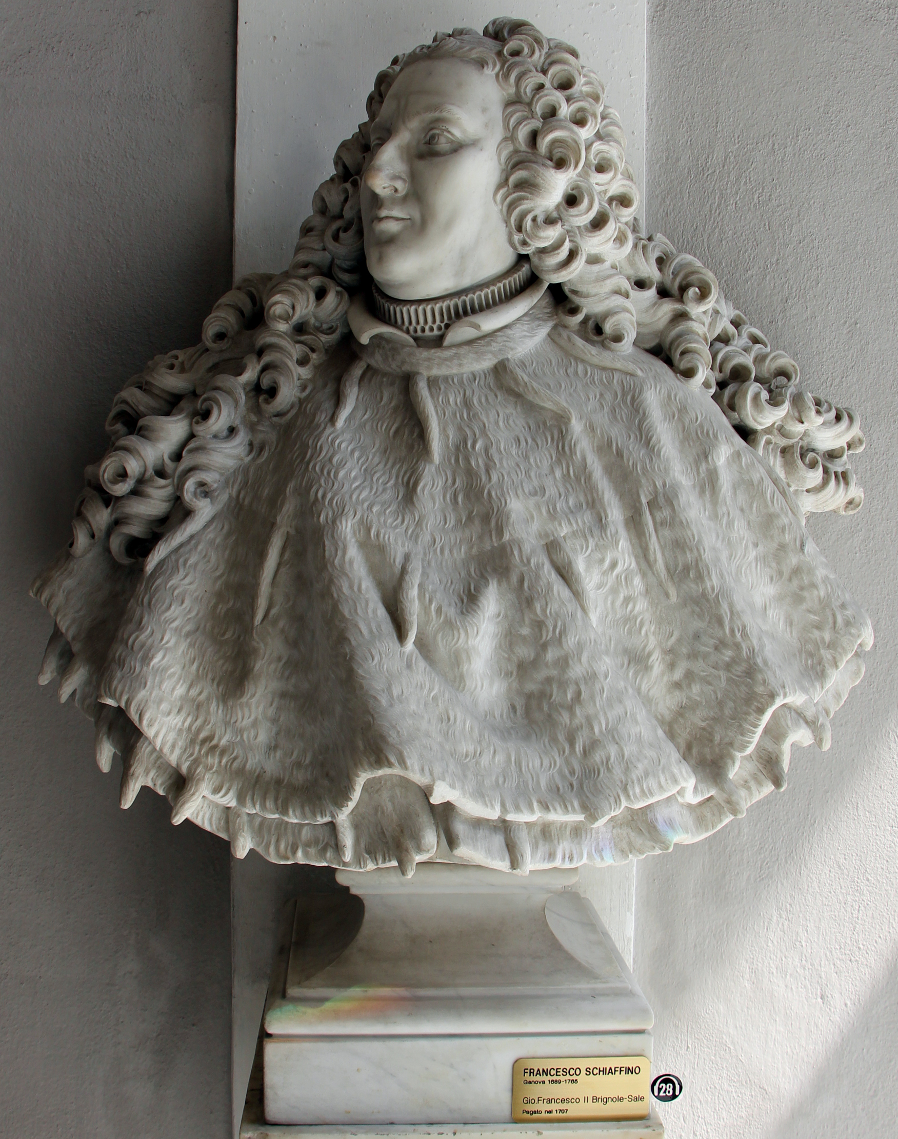 Palazzo Rosso - Musei di Strada Nuova The making of this document was supported by Wikimedia CH. (Submit your project!) For all the files concerned, please see the category Supported by Wikimedia CH. This is a photo of a monument which is part of cultural heritage of Italy.